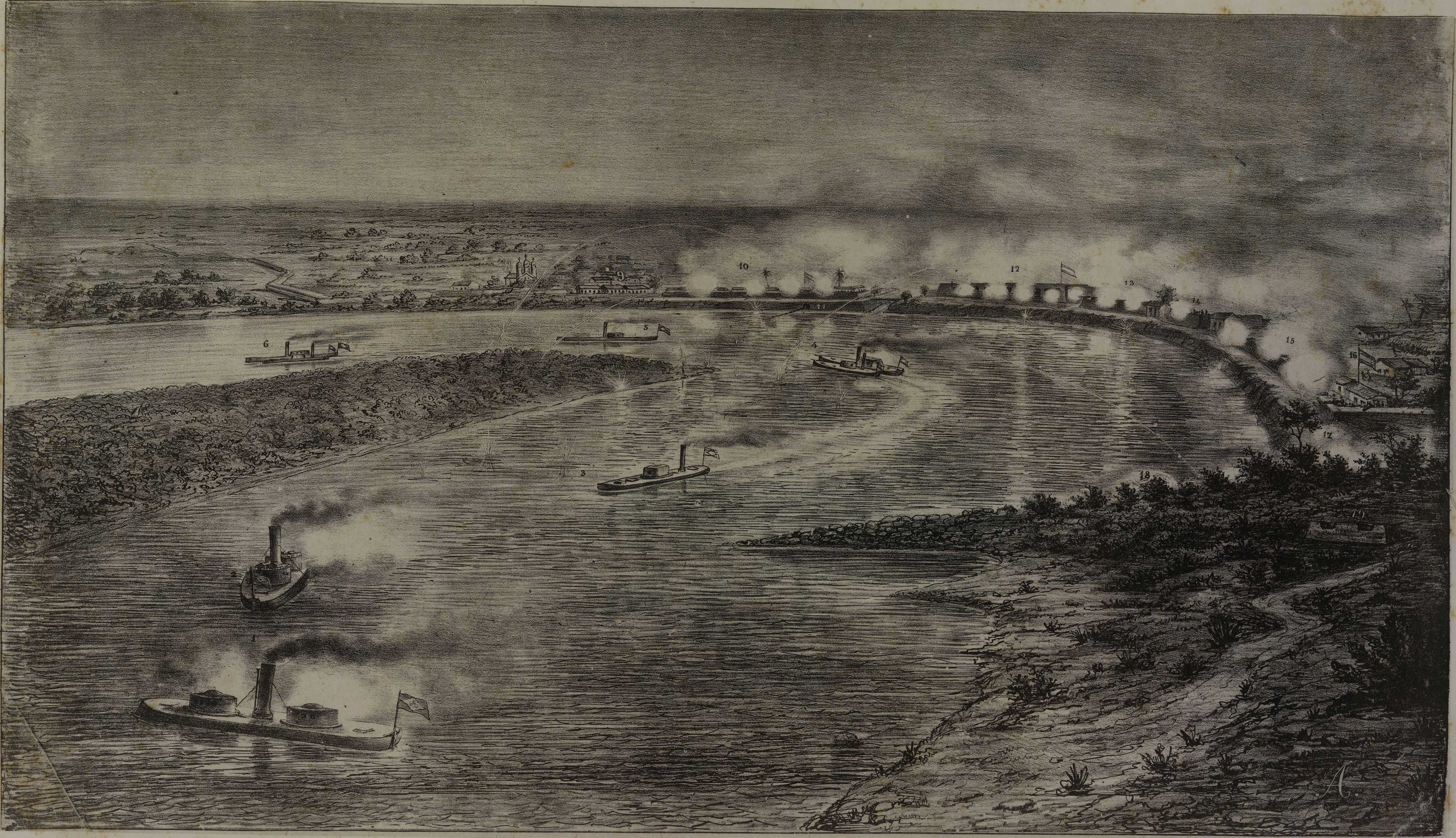 Passagem de Humaytá: effectuada, na noite de 19 de Fevereiro de 1868, pelos encouraçados Barroso, Bahia e Tamandaré, levando a reboque os monitores Rio Grande, Alagoas e Pará.